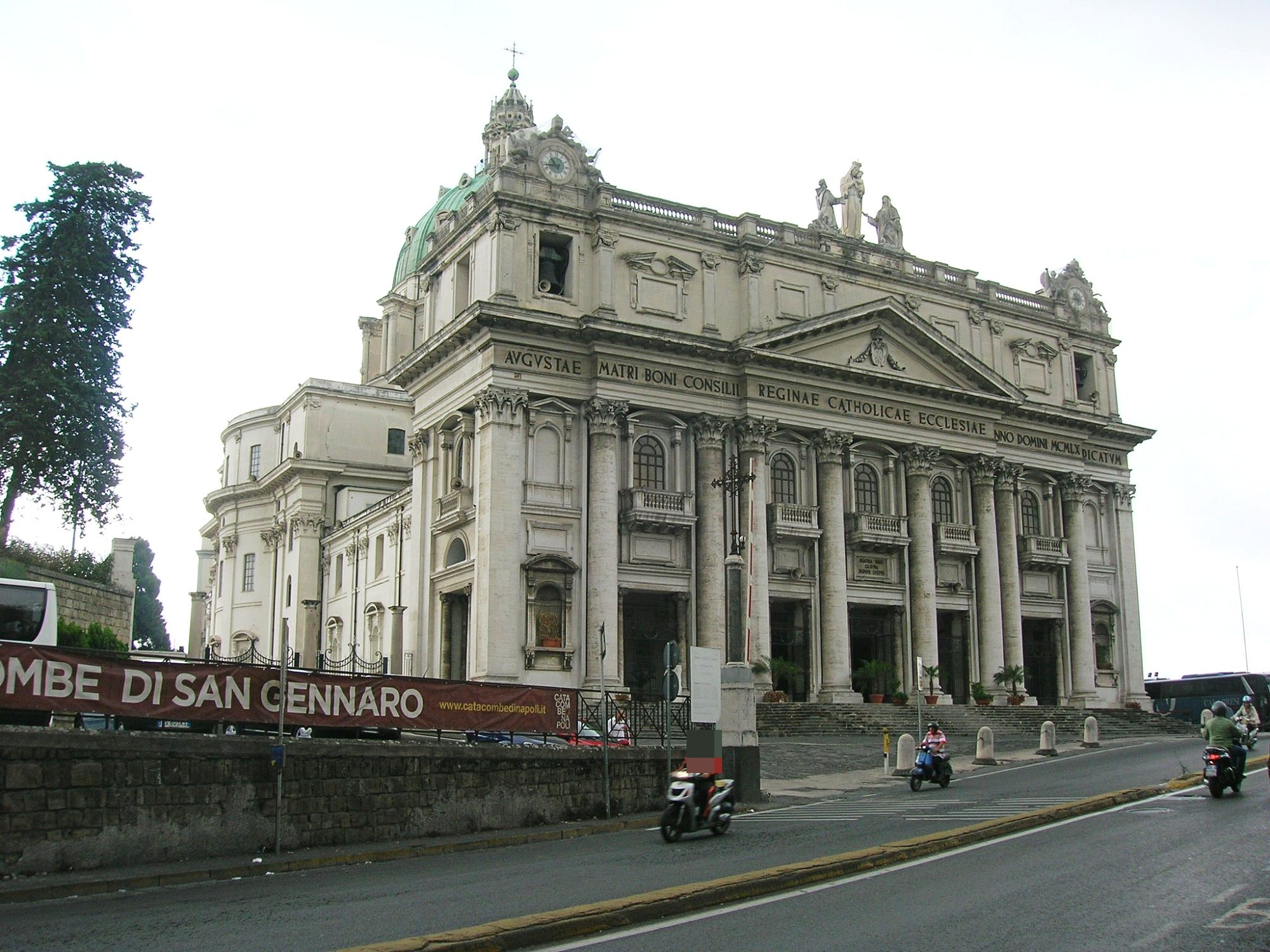 Basilica dell'Incoronata Madre del Buon Consiglio